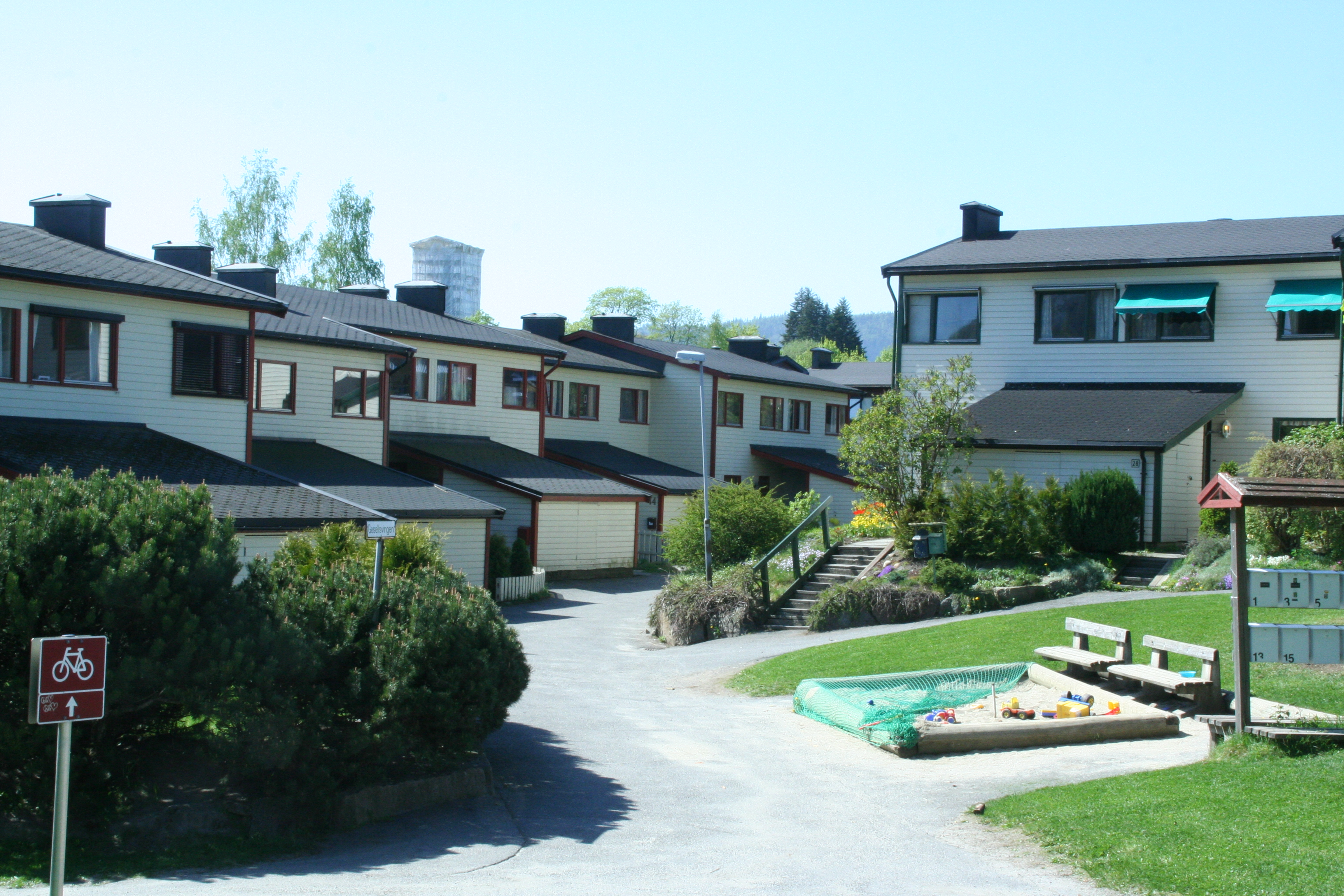 Gesellsvingen 2 på Rykkinn i Bærum.